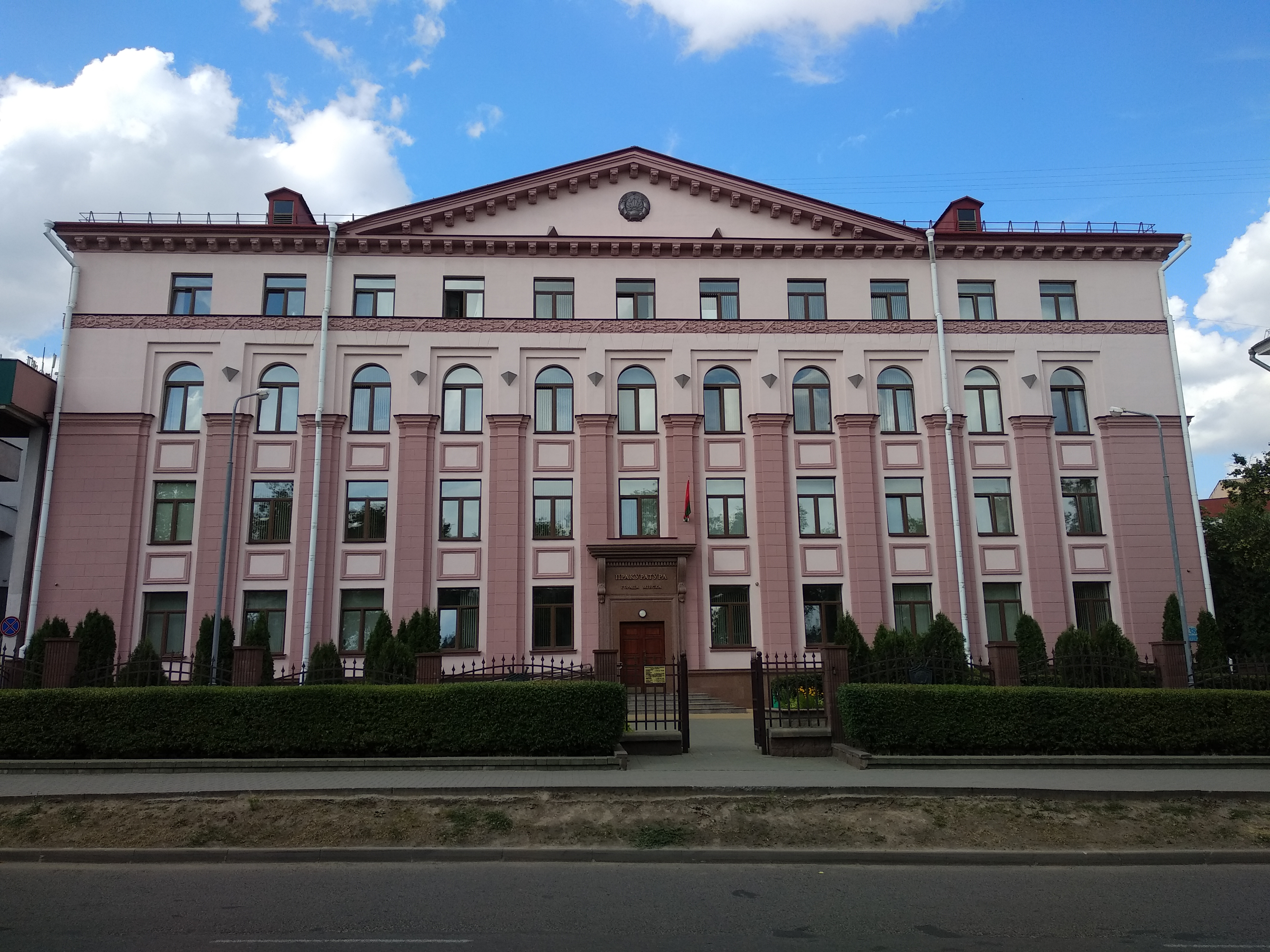 Street in Minsk, Belarus